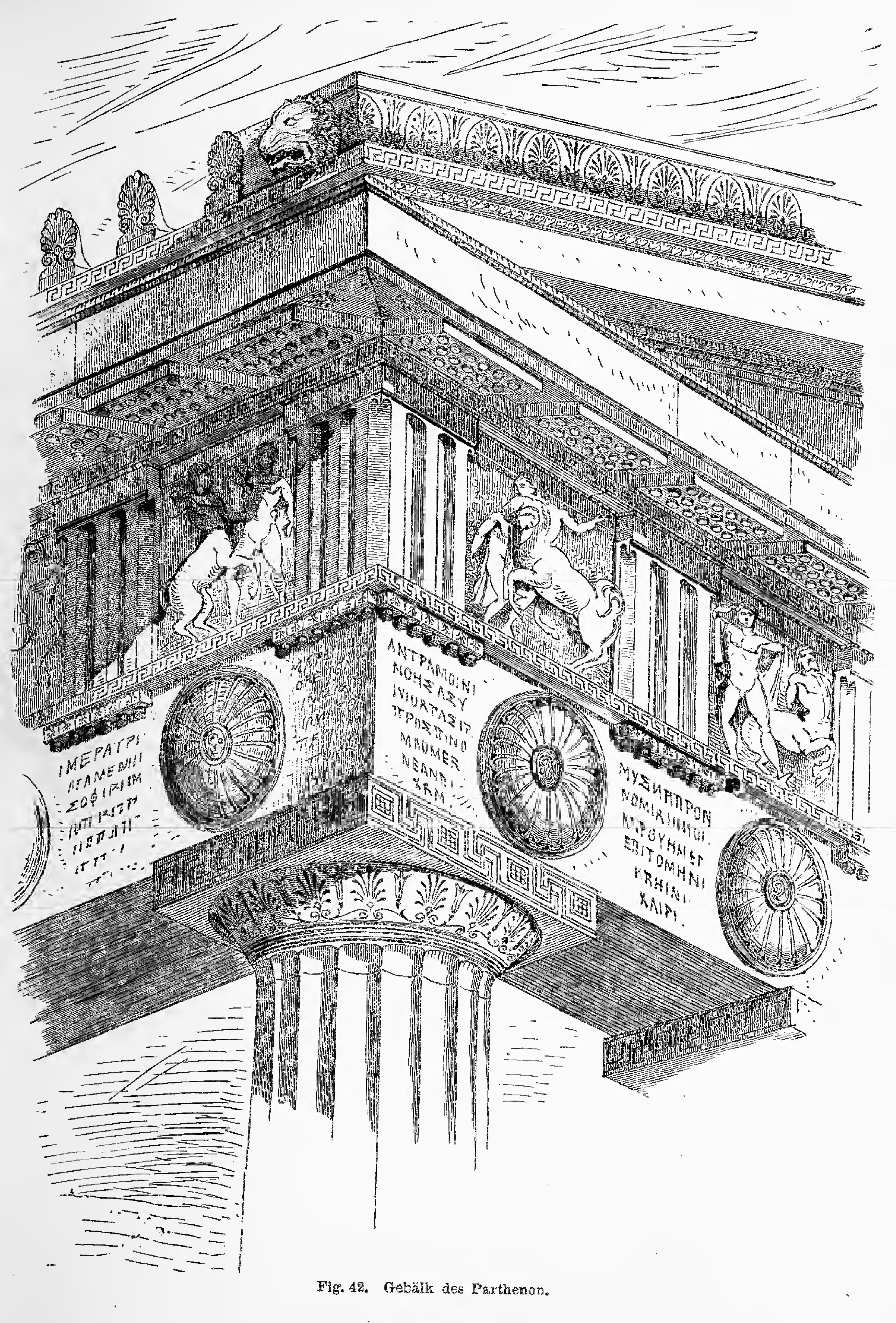 Gebälk des Parthenon